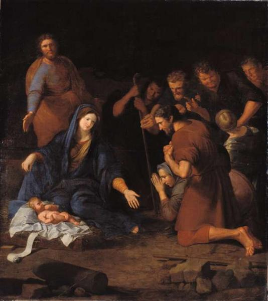 ADORATION DES BERGERS